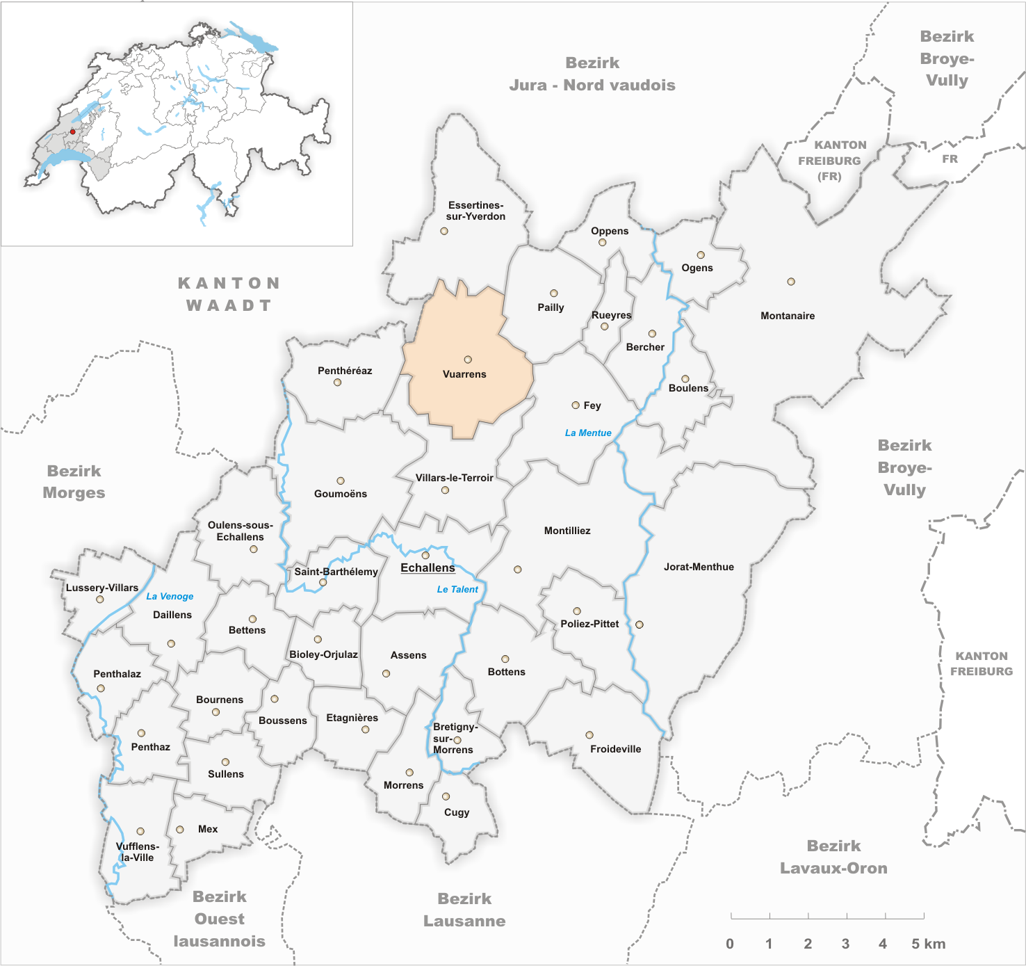 Municipality Vuarrens